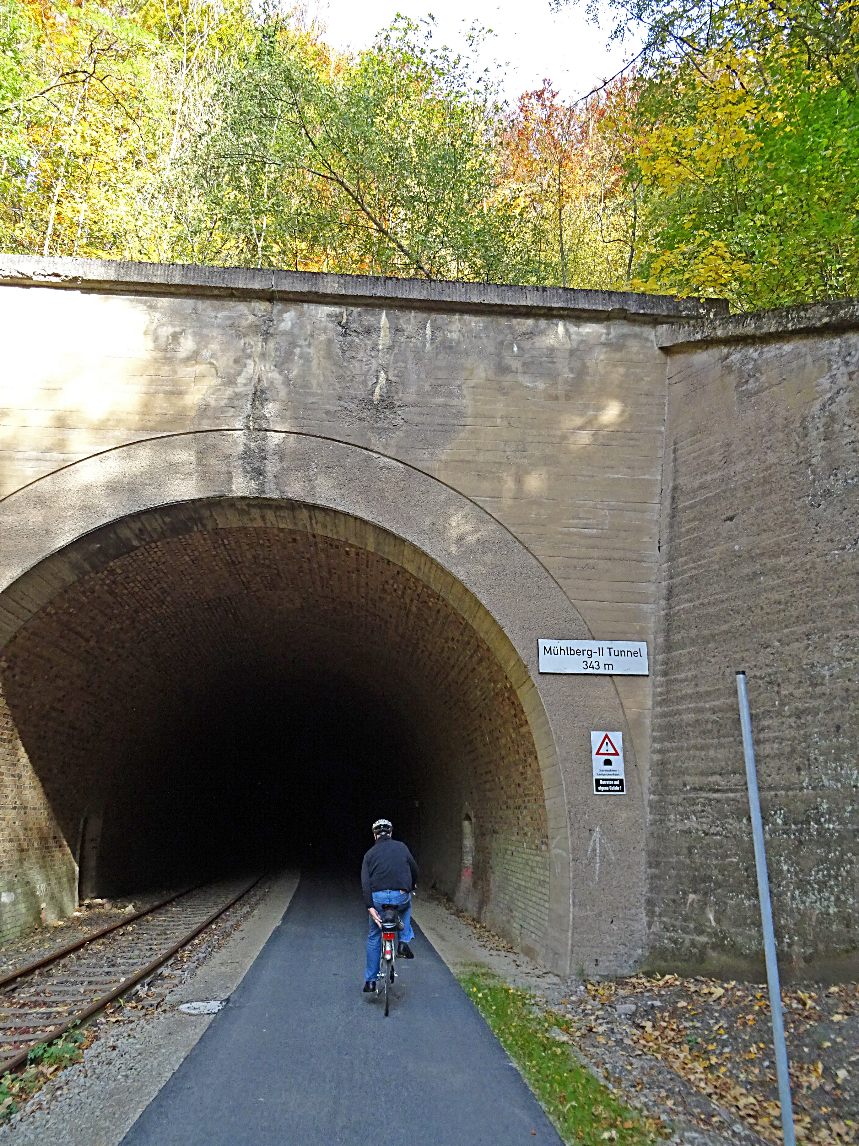 Mühlberg II Tunnel bei Effelder 343 m